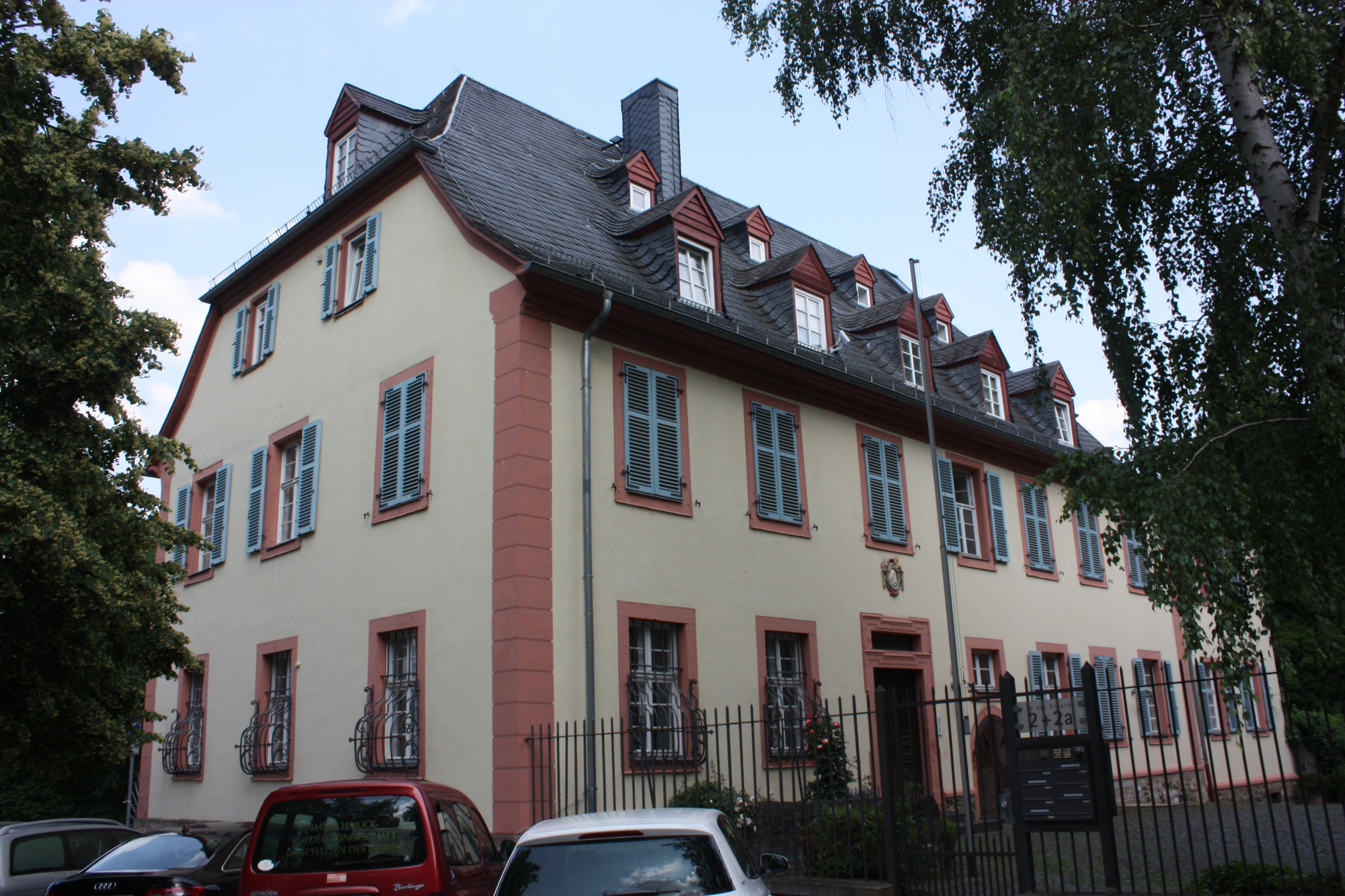 Limburg (Altstadt), Hessen: Ehemaliger Stadthof des Kloster Eberbach